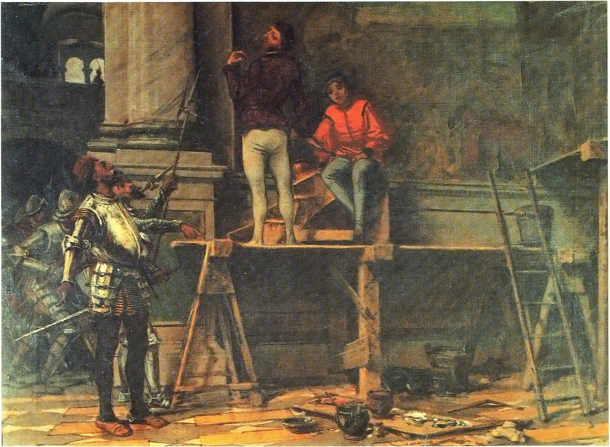 Floriano Ferramola rifiuta di abbandonare il cantiere davanti alle truppe di Gaston de Foixtitle QS:P1476,it:"Floriano Ferramola rifiuta di abbandonare il cantiere davanti alle truppe di Gaston de Foix" label QS:Lit,"Floriano Ferramola rifiuta di abbandonare il cantiere davanti alle truppe di Gaston de Foix"